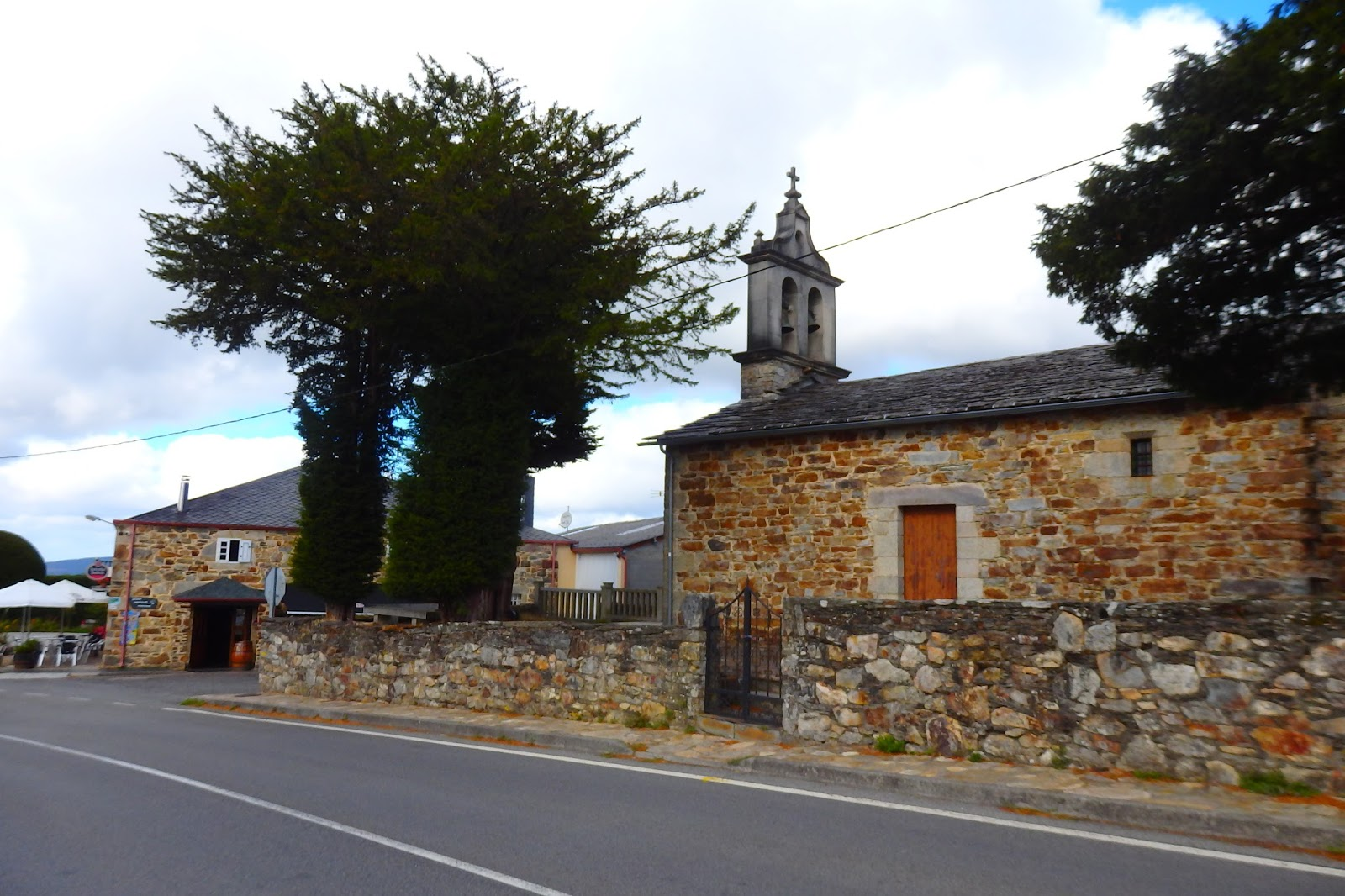 Igrexa da Fontaneira, Baleira.